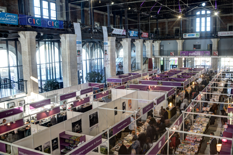 Photo allégée pour le web du salon du livre des Rendez-vous de l'histoire en plongée